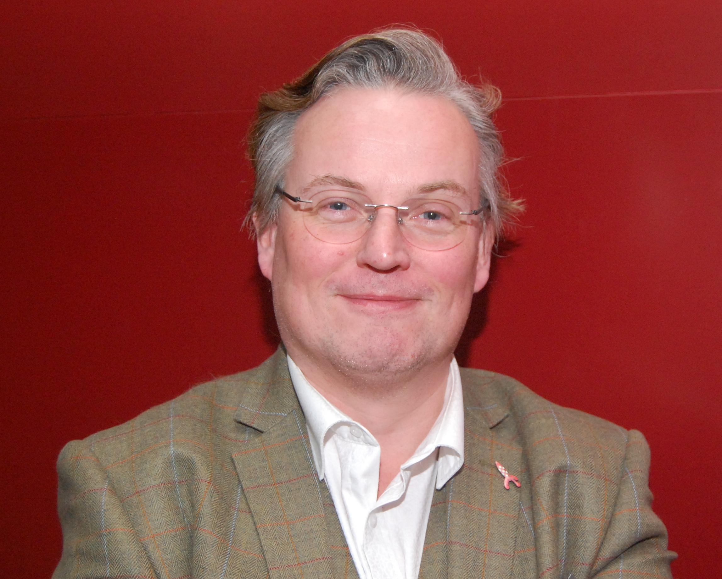 Nieuwjaarsbijeenkomst Wikimedia Nederland 21 januari 2017 Museum Volkenkunde Leiden